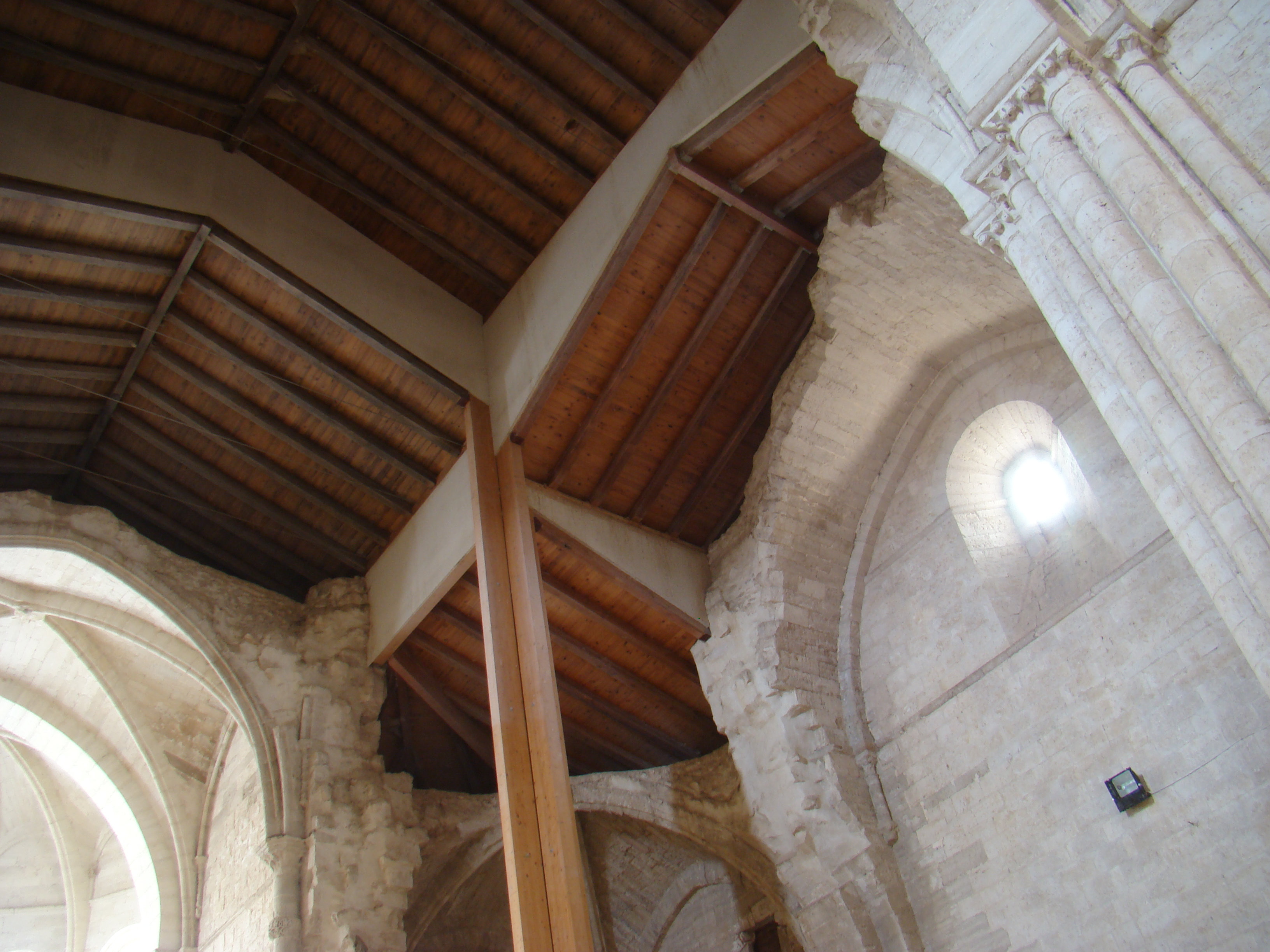 Monasterio de Palazuelos en la provincia de Valladolid. Interior de la iglesia. El pilar de madera sustituye al que se derrumbó en 1998, arrastrando consigo las bóvedas y la espadaña antigua.